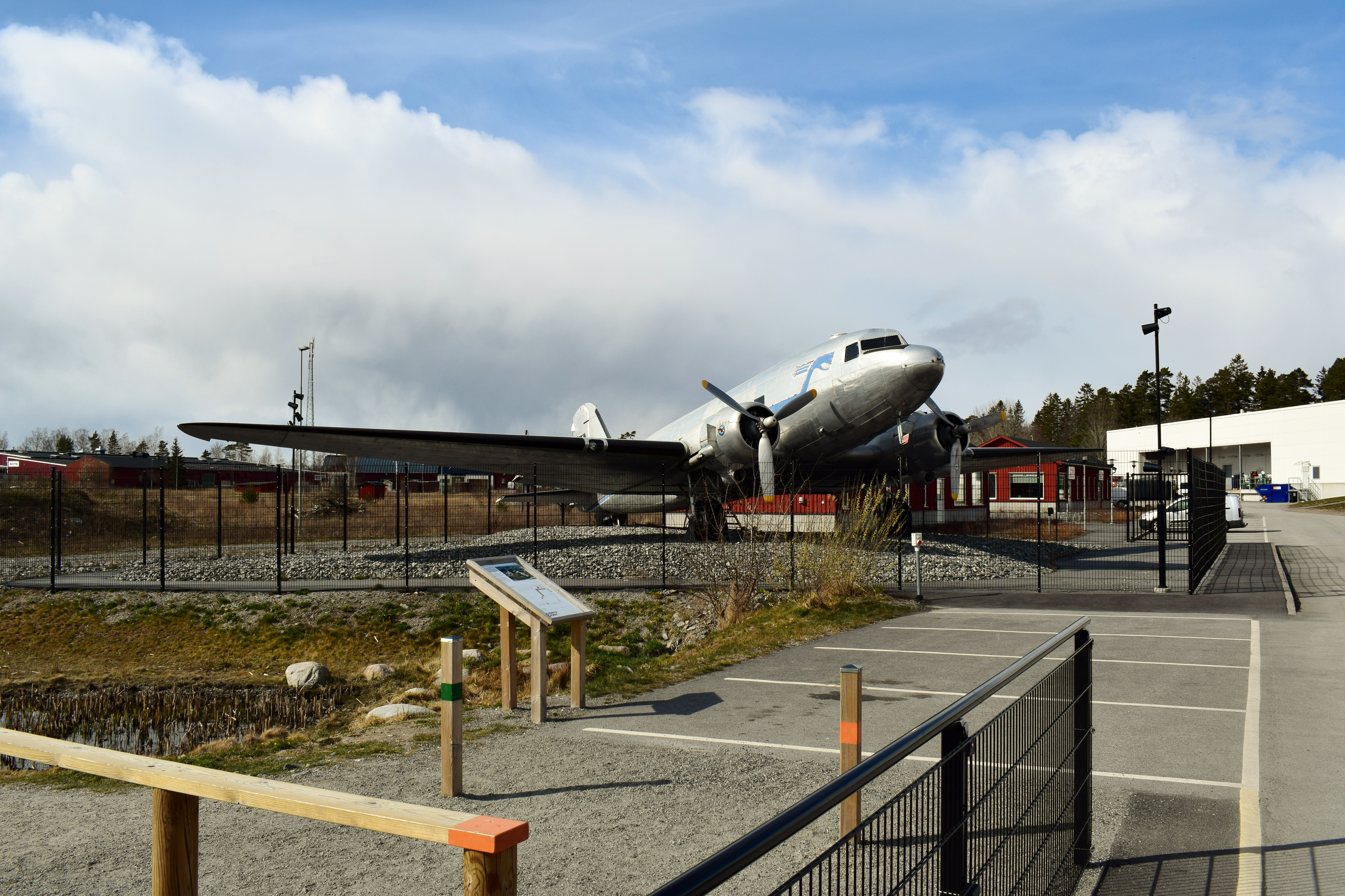 DC-3 (C-47A-40-DL Skytrain), 42-24049 (SE-AYM) vid Cafe DC-3 i Norrtälje. Tillverkades 1943 för USAAF, serie nr 42-24049. Caféet uppfört 1949 av affärsmannen Karl Östman. Skandinavisk Aero köpte 3 surplus C-47 1946, detta är den 3:e som blev reservdelsflygplan erhöll reg SE-AYM, men registrering fullföljdes aldrig. Byggdes om till kafé 1949 och stängdes 1975. Caféet revs 1977 och DC-3:an fördes till Civilförsvarets övningsanläggning i Rosersberg. Flygplanet har därefter under ett antal år även funnits på Arlanda, (Arlandasamlingarna) men är nu tillbaka i Norrtälje och placerad sedan 2017 vid Norrteljeporten.